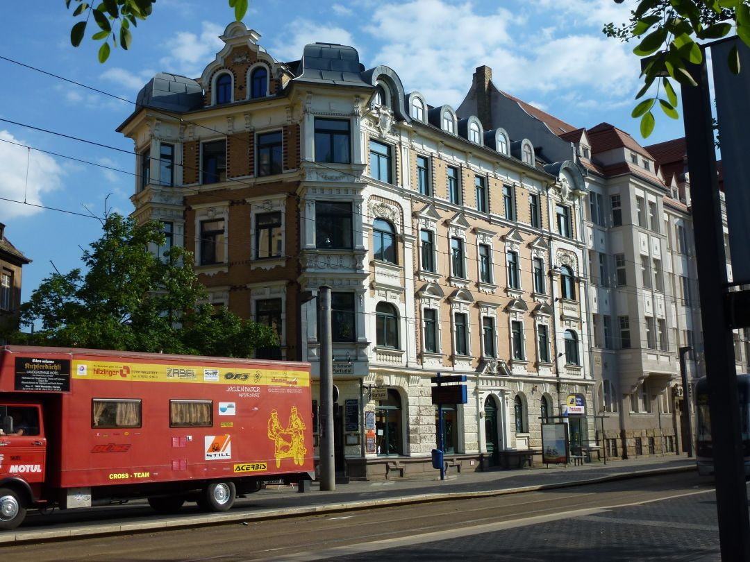 Rekonstruiertes Wohnhaus an der Angerbrücke, Leipzig-Lindenau